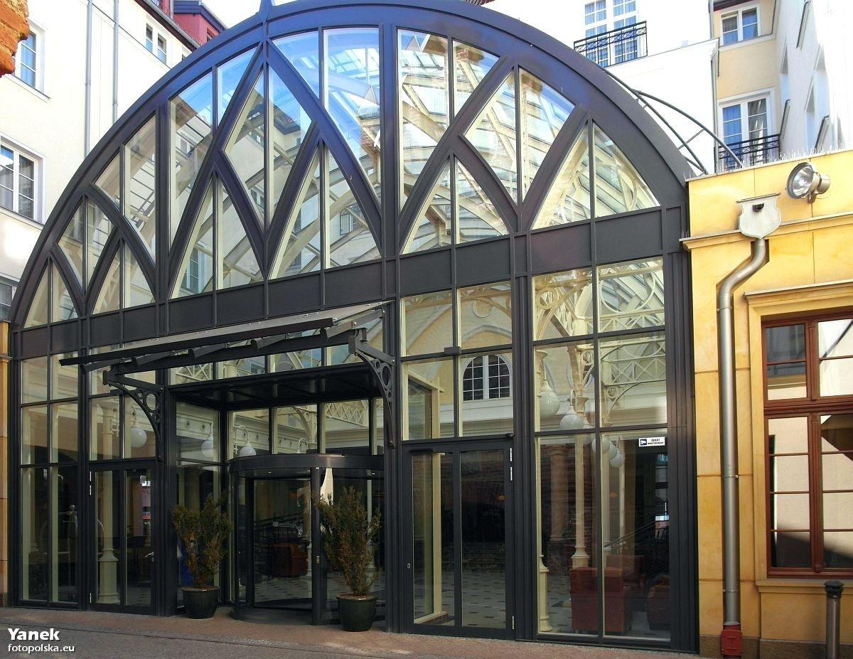 Główne wejście do hotelu, schowane za kamienicą Powroźnicza 3.